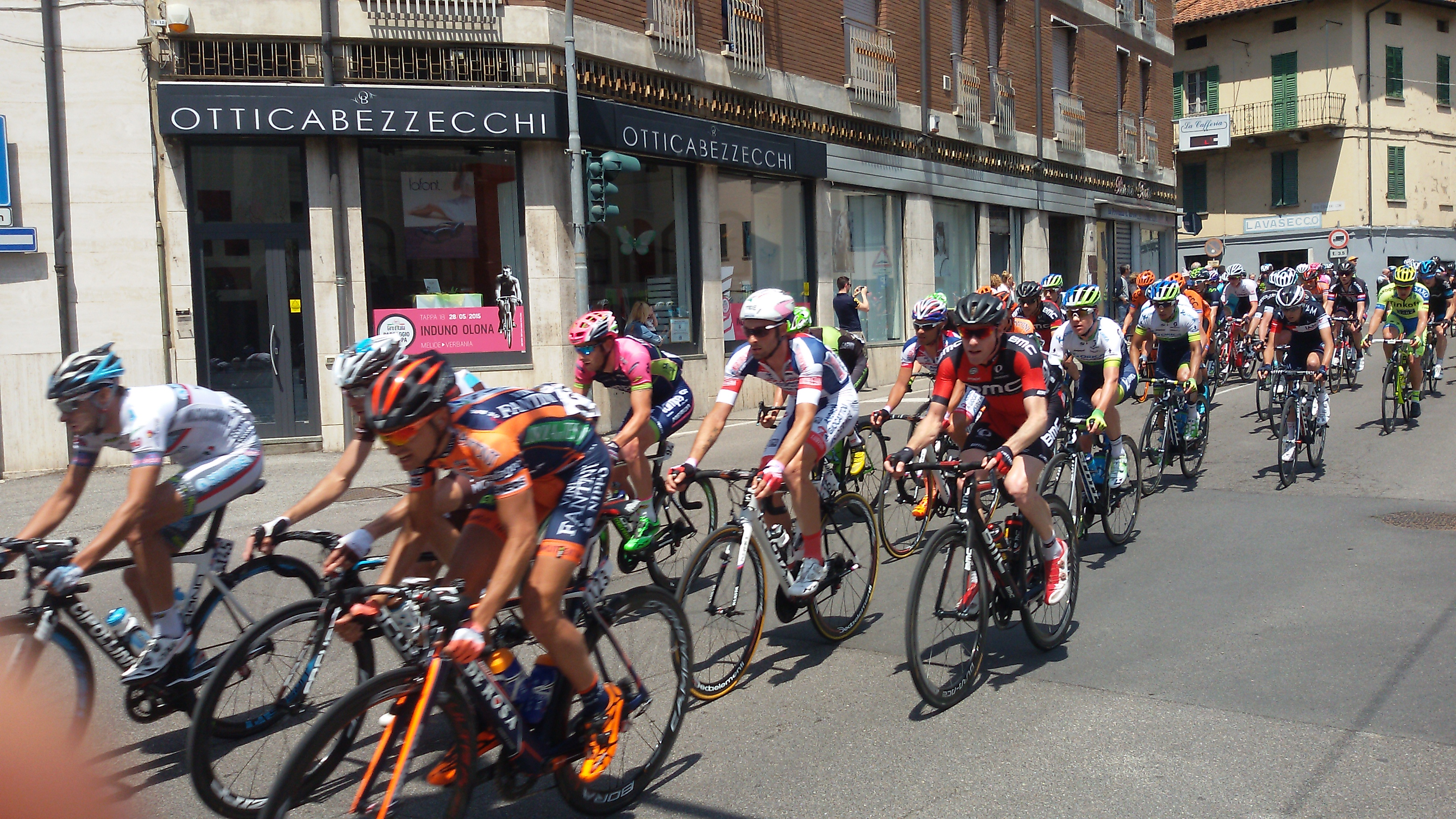 Passaggio del Giro d'Italia a Induno Olona, 18° tappa Melide - Verbania